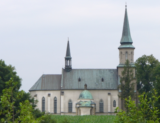 Kościół pw. Przemienienia Pańskiego w Paszkówce (zabytek nr rejestr. A-969/M)